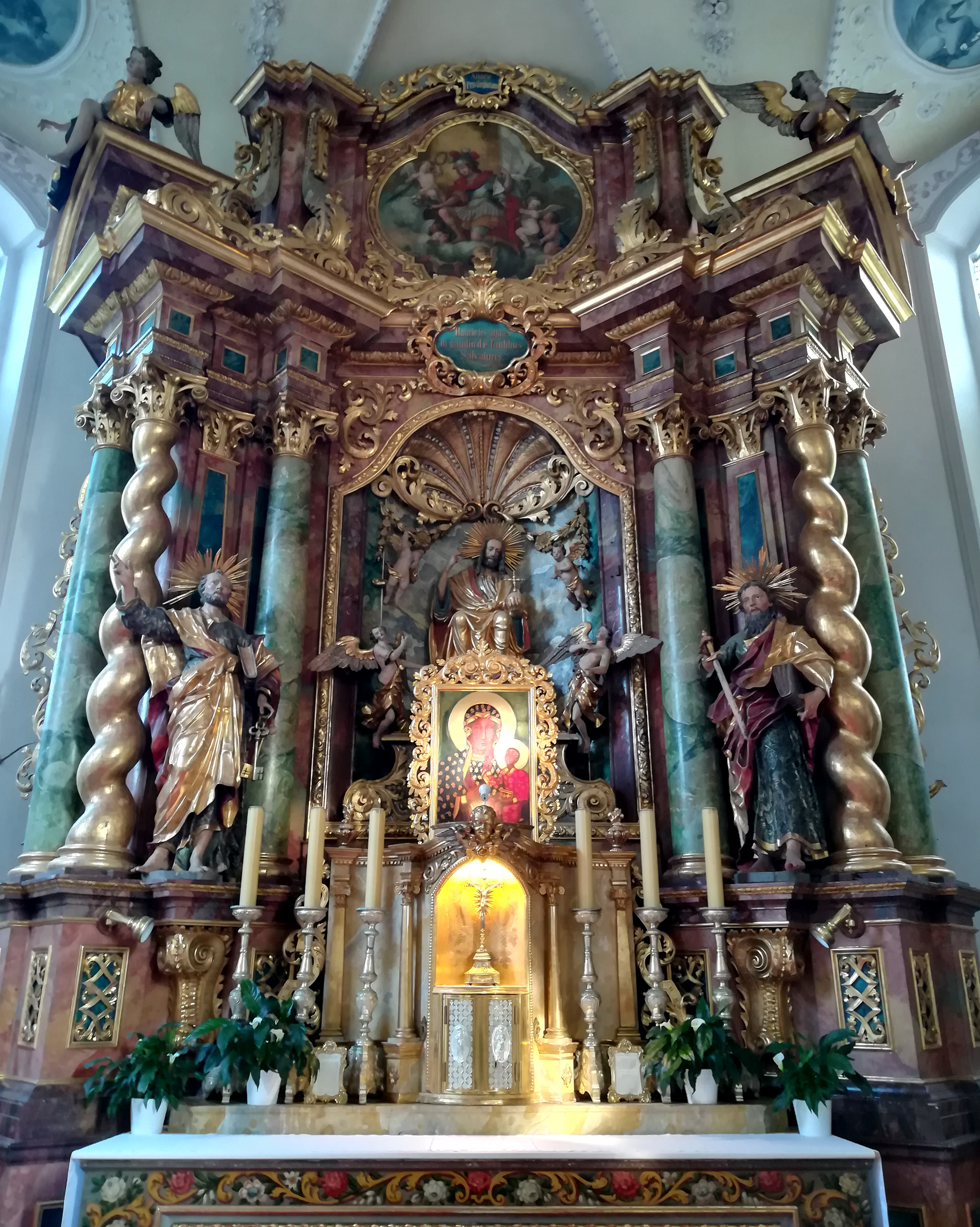 Altar der Salvatorkirche Mainburg